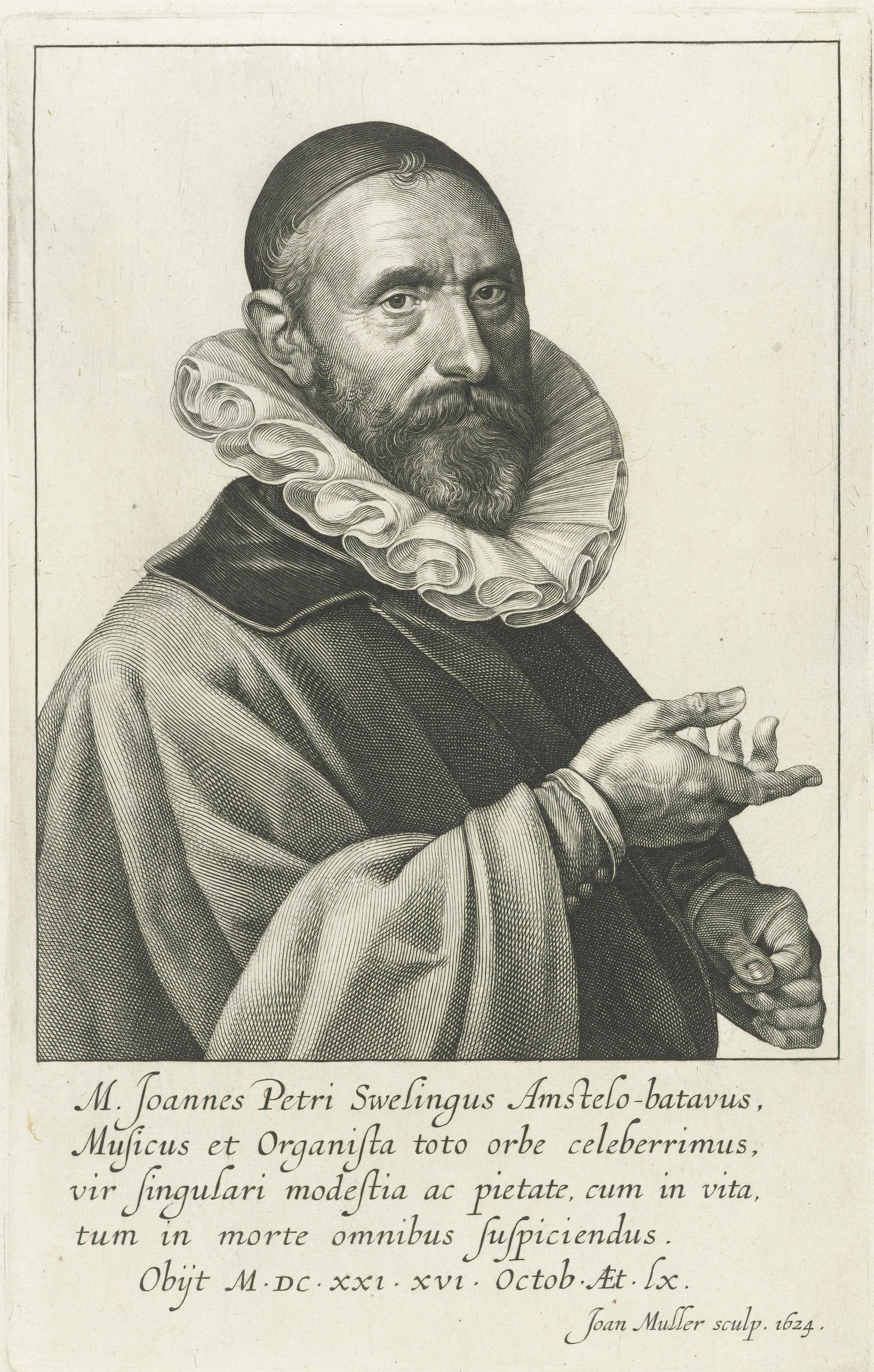 Depicted person: Jan Pieterszoon Sweelinck